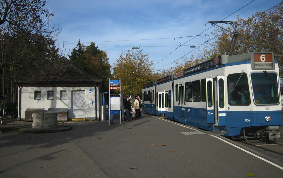 Tramhaltestelle Zürich Zoo